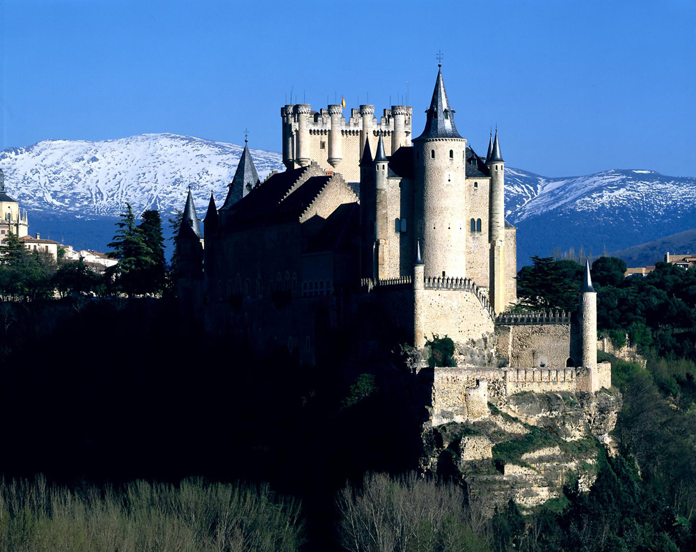 Cultural Heritage Spain RI-51-0000861